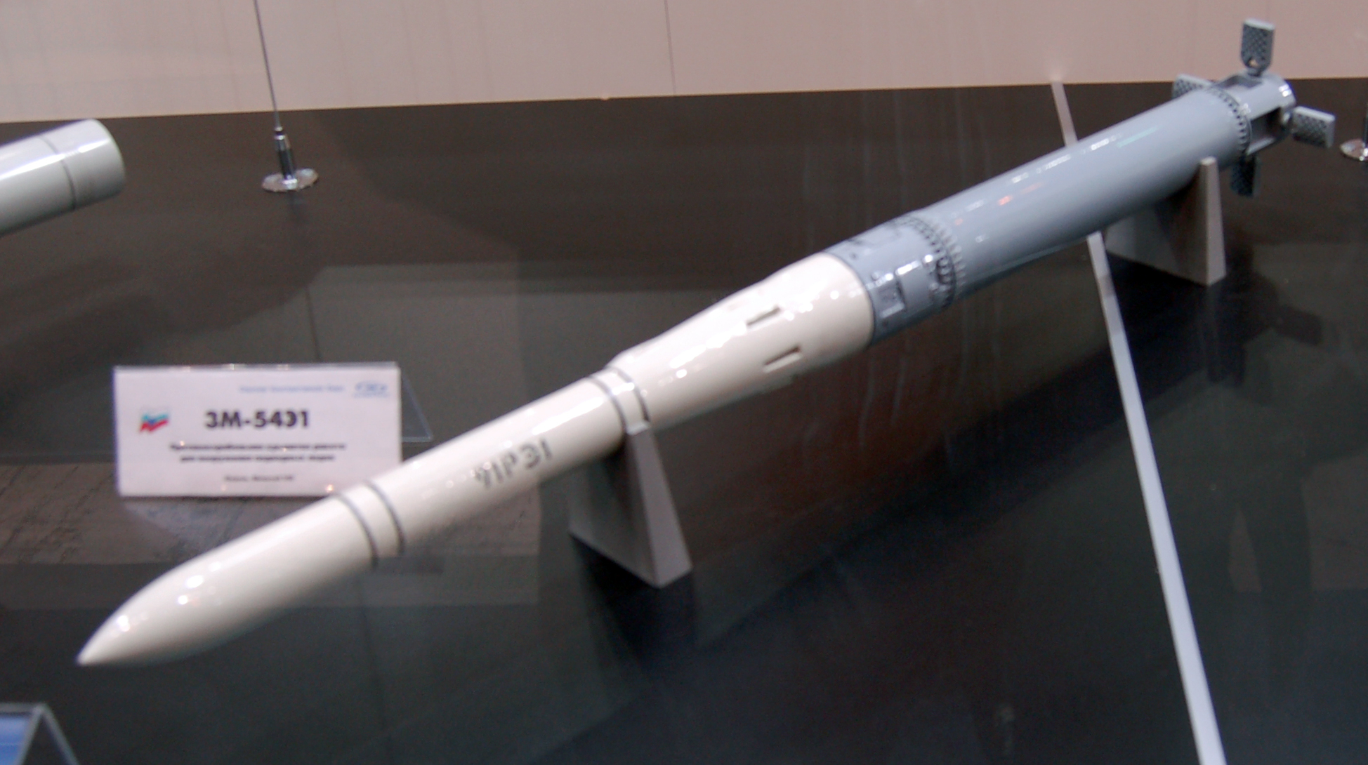 Макет противолодочной ракеты 91РЭ1 на МАКС-2009